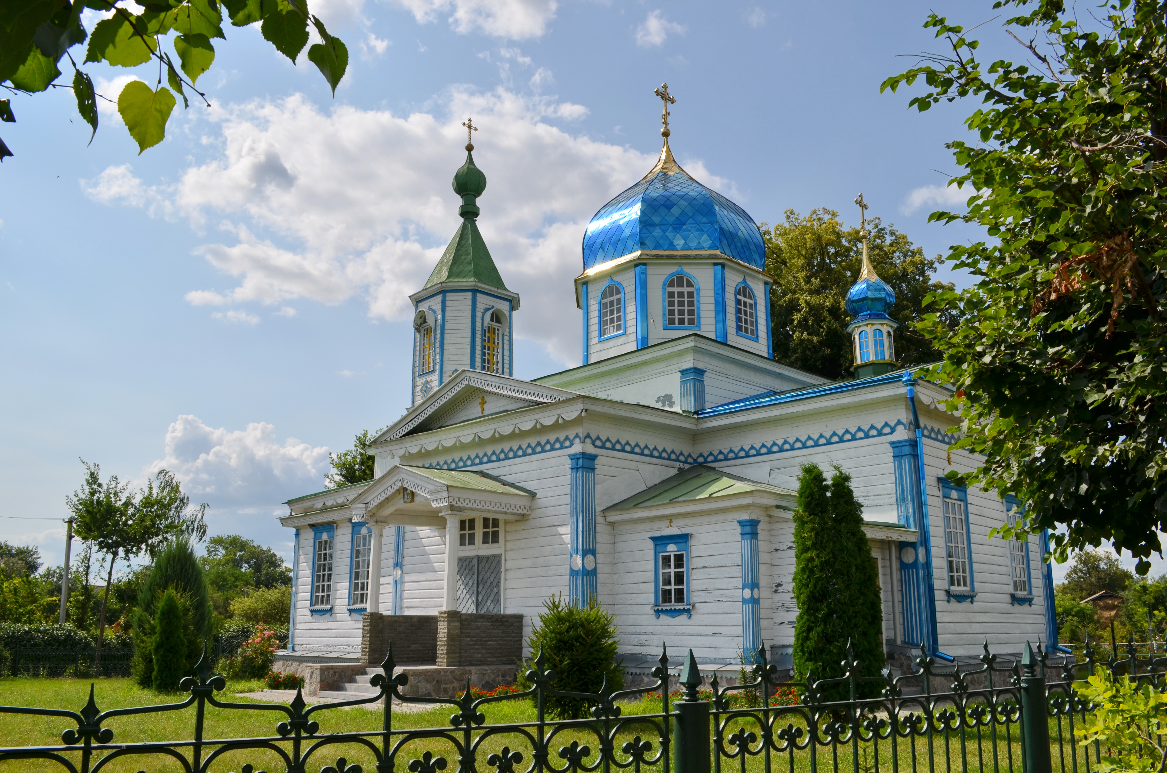 Полтавська обл., Миргородський район, Село Мальці